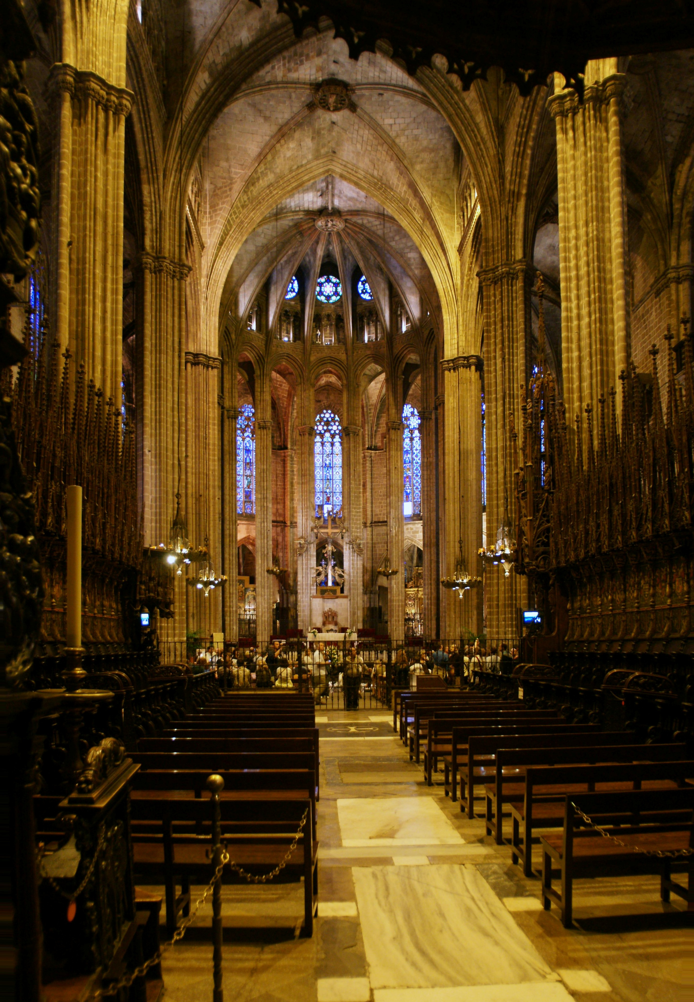 La Catedral ist eine gotische Kathedrale in Barcelona und Metropolitankirche des Erzbistums Barcelona. Sie befindet sich am Platz Pla de la Seu im Stadtviertel Barri Gòtic und ist der Heiligen Eulalia geweiht.